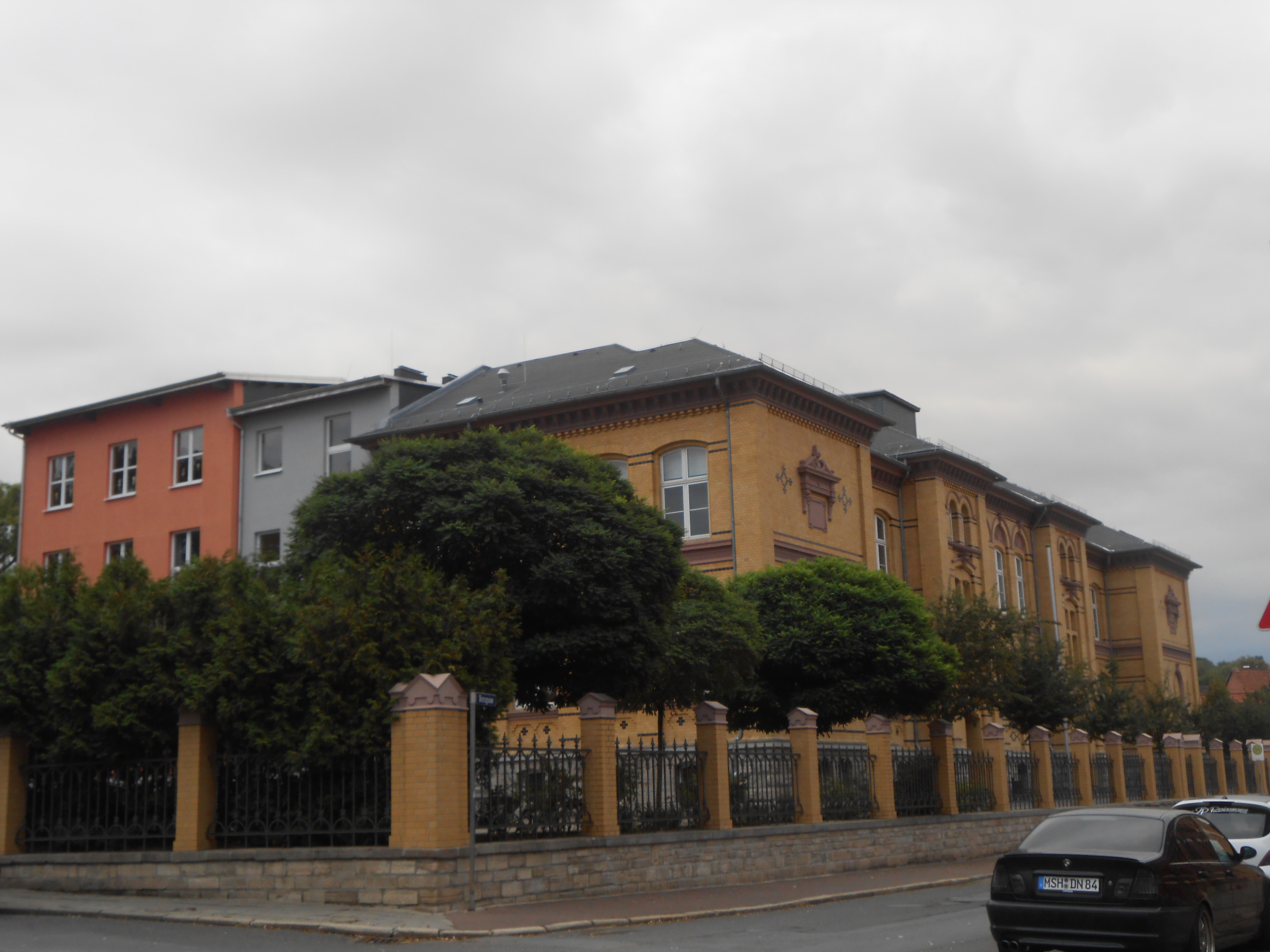 Thomas Müntzer Schule Sangerhausen Seitenansicht